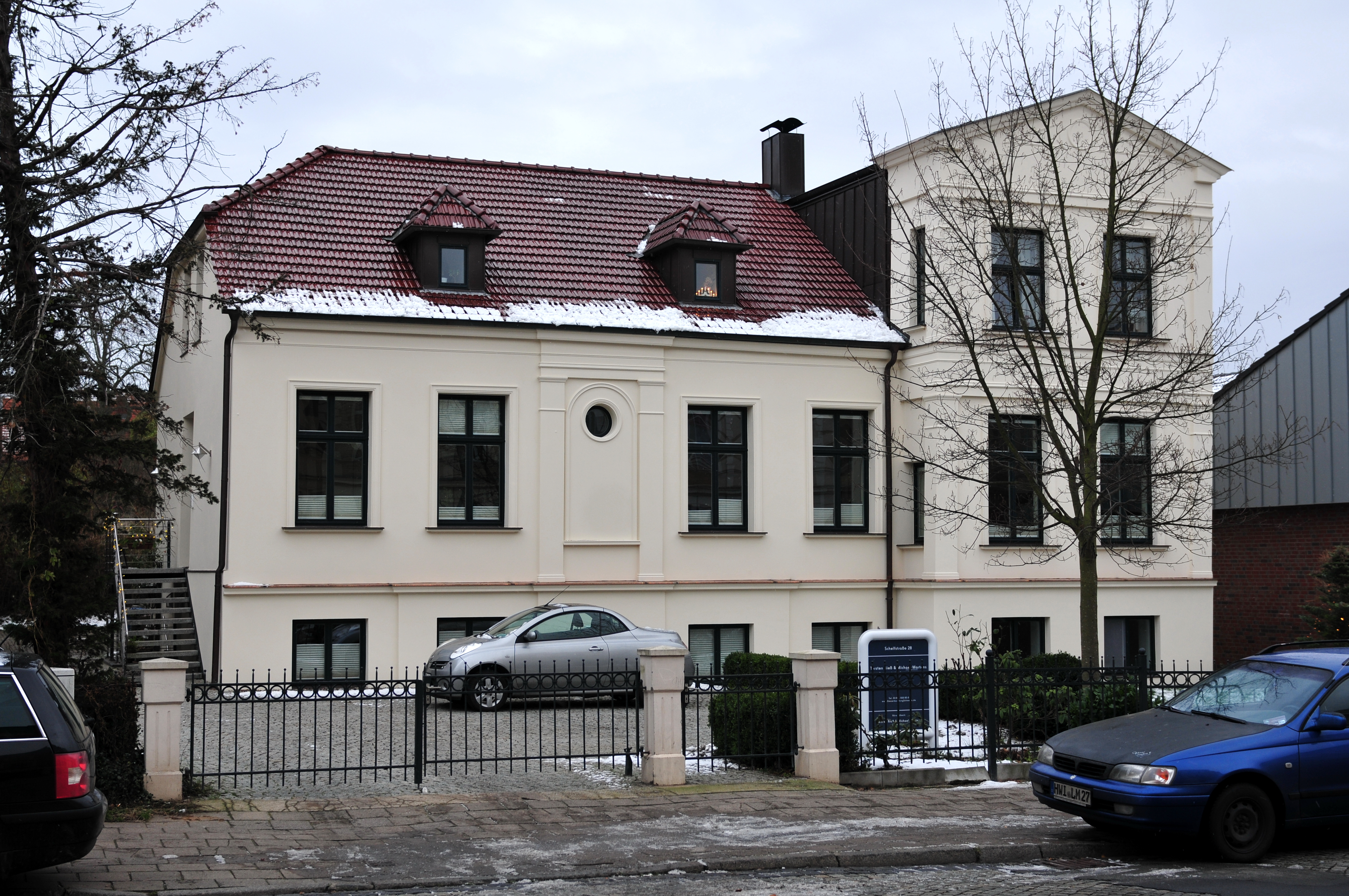 Das denkmalgeschützte Wohn- und Geschäftshaus Schelfstraße 28 in Schwerin, Mecklenburg-Vorpommern.